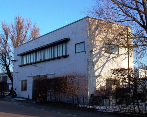 Poortgebouw van de afgebroken woonschool Asterdorp in Amsterdam-Noord, tegenwoordig eigendom van woningcorporatie Ymere